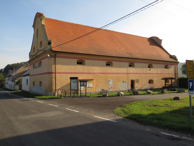 Sýpka, jižní okraj vsi, parc. st. 23, Prostřední Lhota.